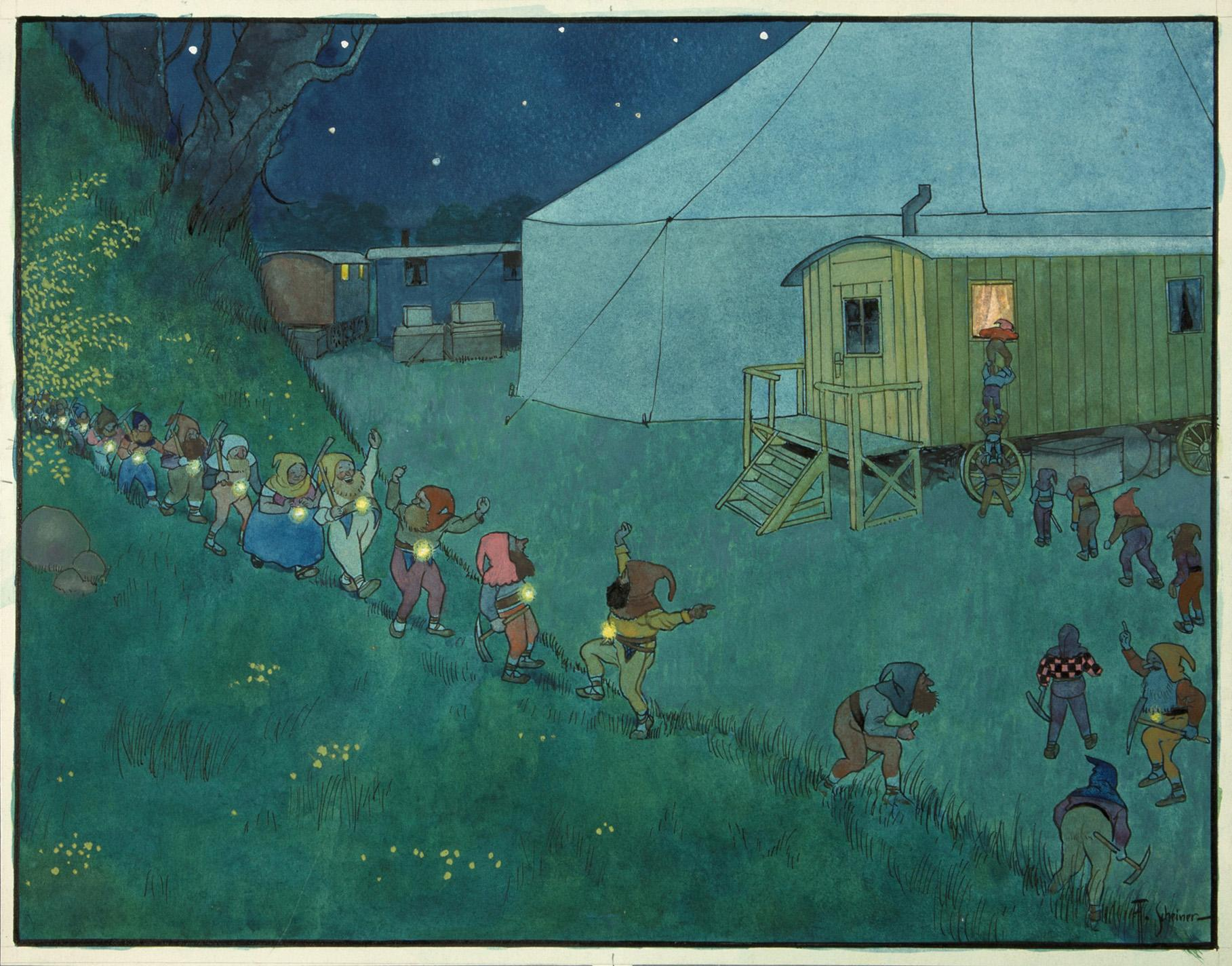 Umzug der Trolle, rechts unten signiert: Art. Scheiner, kombinierte Technik/Papier, 24 × 31 cm